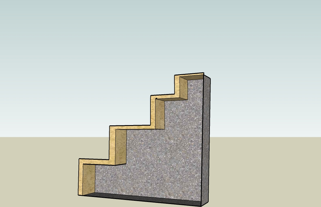 מדרגות רום ושלח